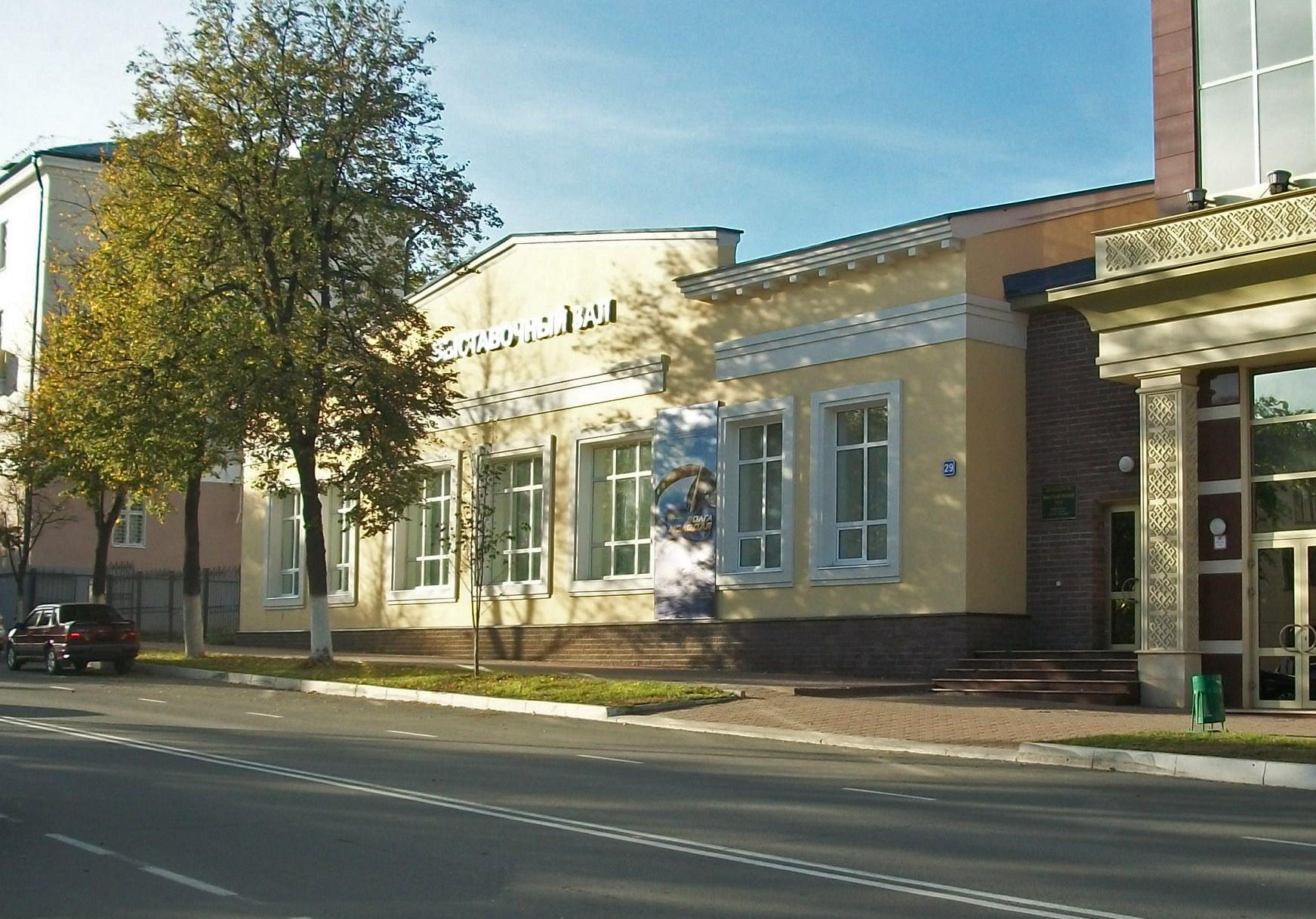 Выставочный зал Мордовского республиканского музея изобразительных искусств им. С. Д. Эрьзи.